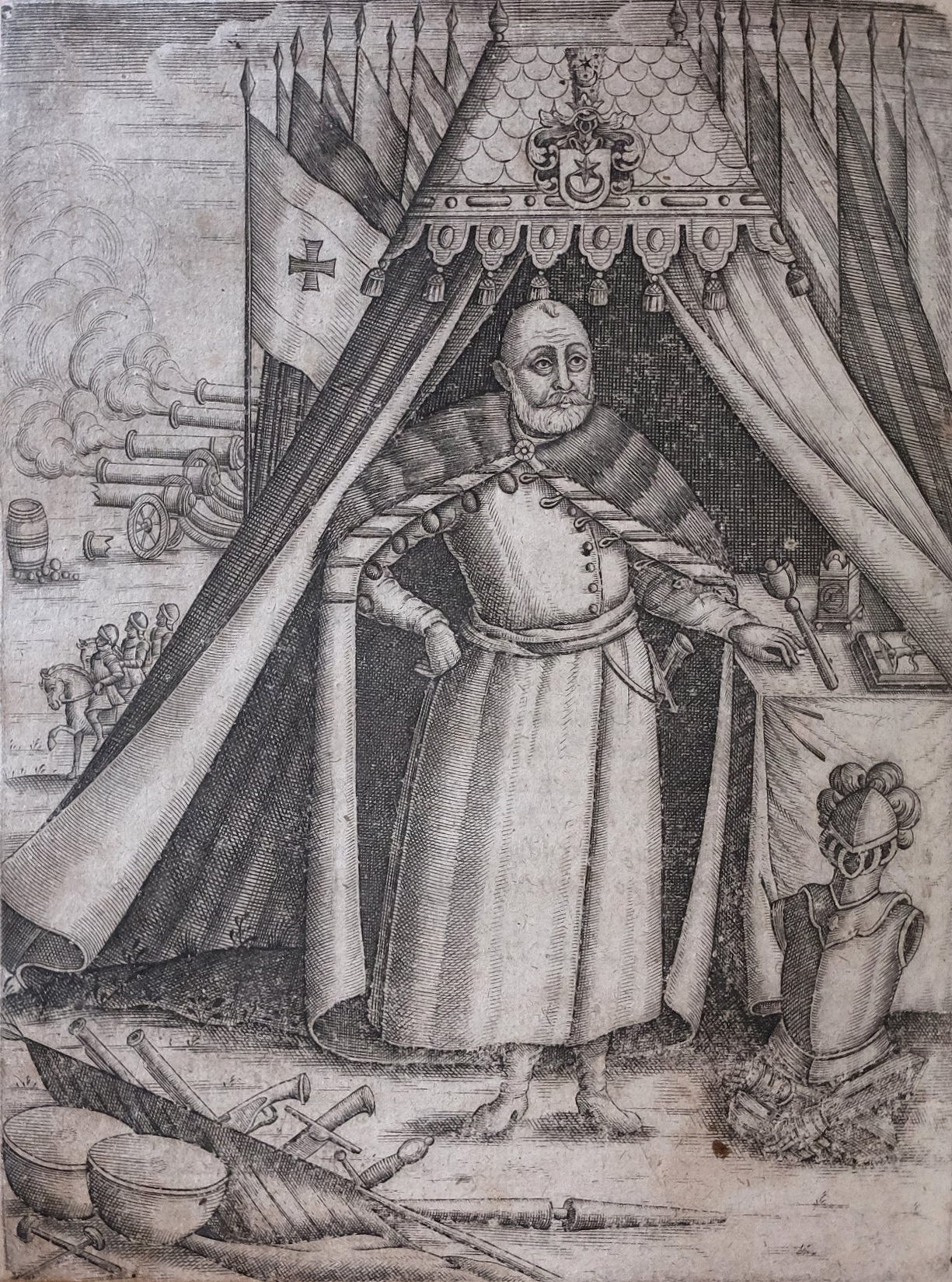 Беларуская (тарашкевіца): Партрэт Яна Скуміна Тышкевіча (Jan Skumin Tyškievič)